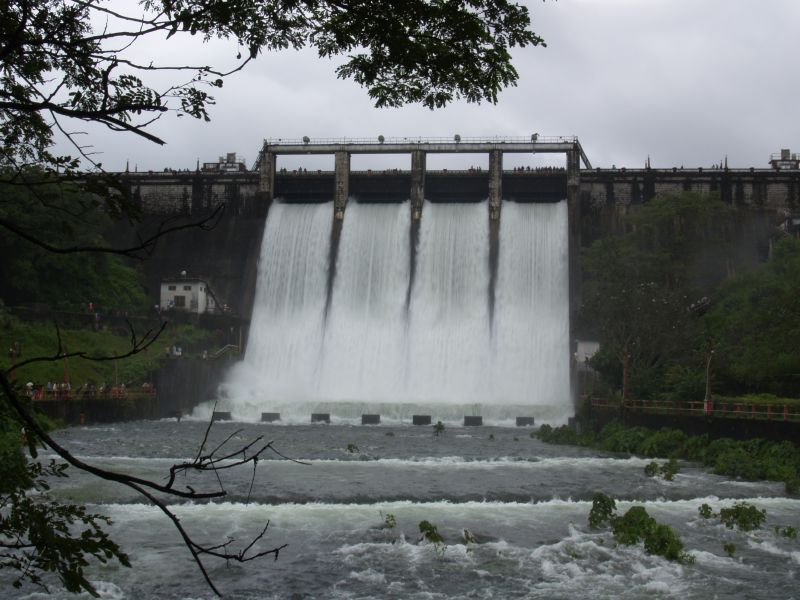 Peechi Dam Kerala